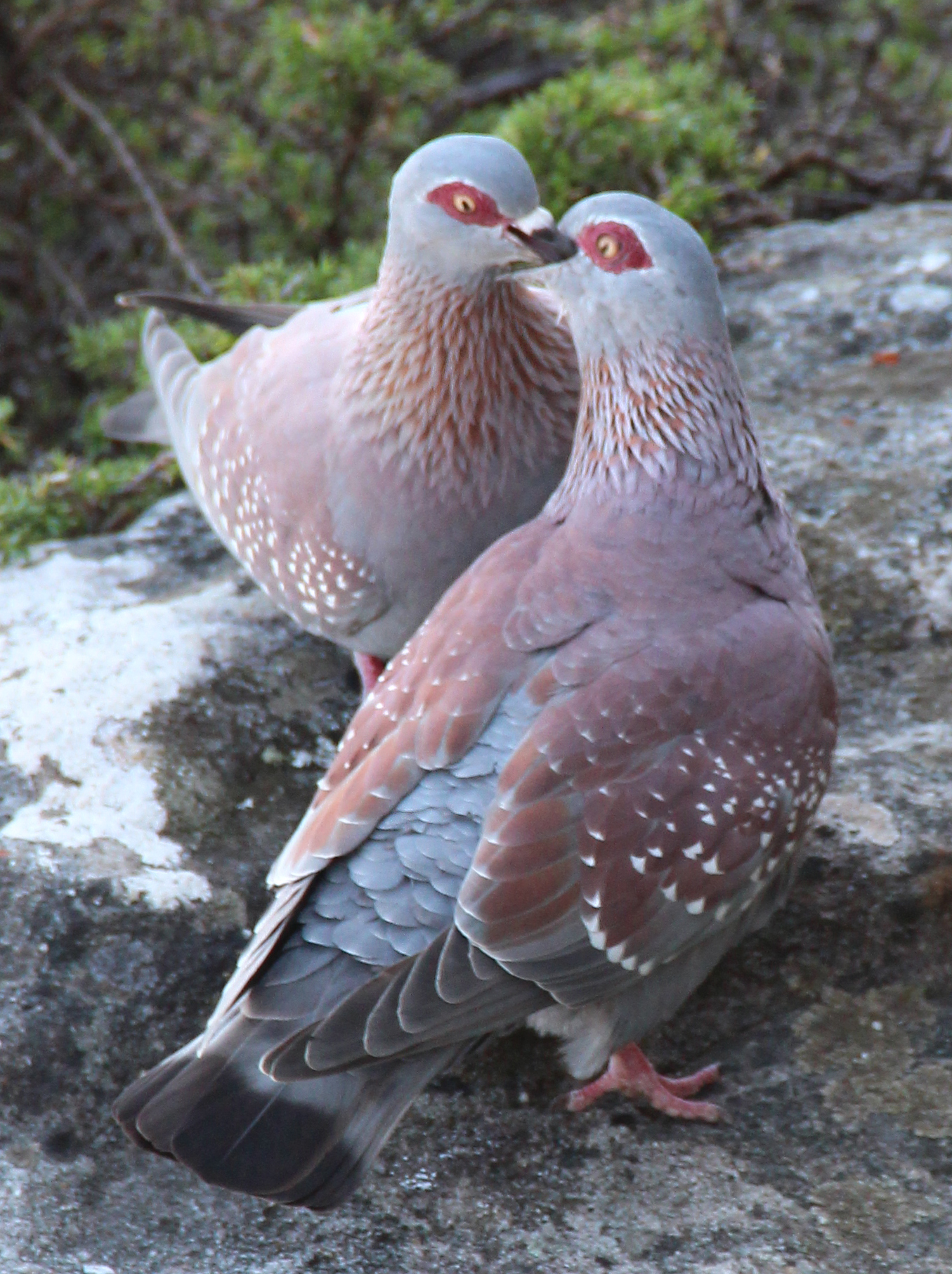 Gespikkelde duif (Columba guinea), paartje op de Tafelberg